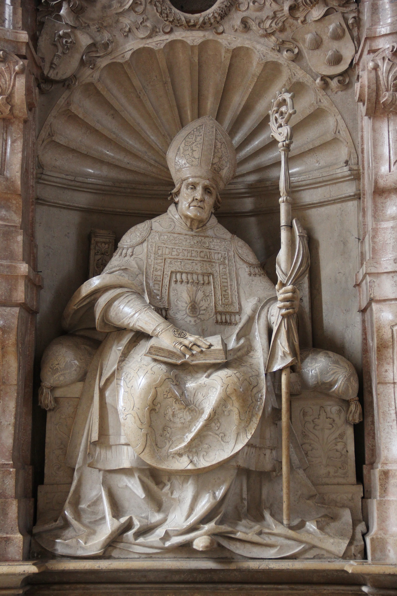 Willibaldsaltar Eichstätt Cathedral Native nameDom zu EichstättLocationEichstätt, Upper Bavaria, GermanyCoordinates48° 53′ 31″ N, 11° 11′ 01″ E Authority control VIAF: 247706570 GND: 4218076-4